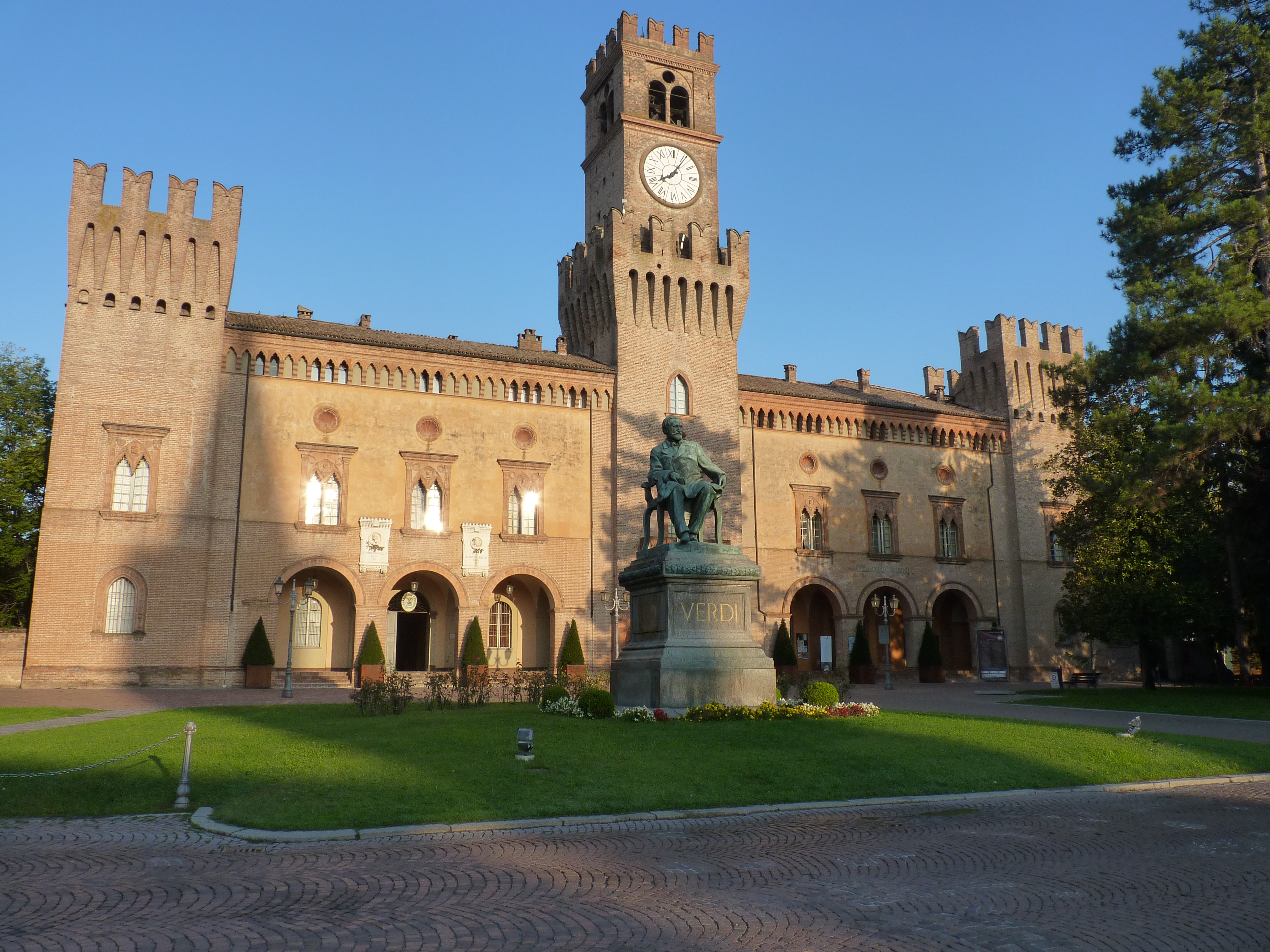 Rocca Pallavicino This is a photo of a monument which is part of cultural heritage of Italy.